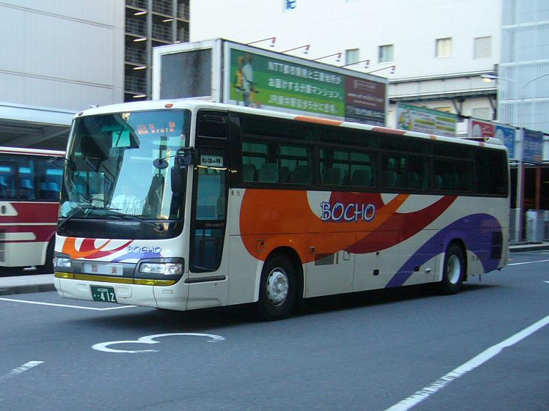 登録番号 山口200か・412 防長交通所属 元・昼特急まいこ号用 2006年10月3日 広島バスセンターにて撮影